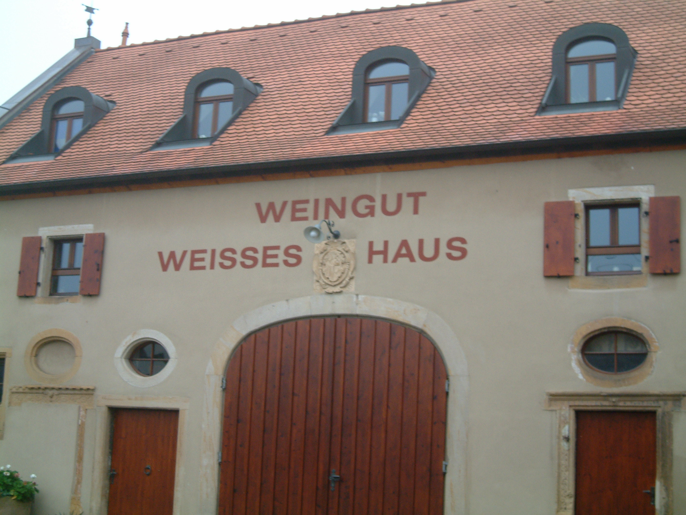 Scheune des Weißen Hauses in Mußbach